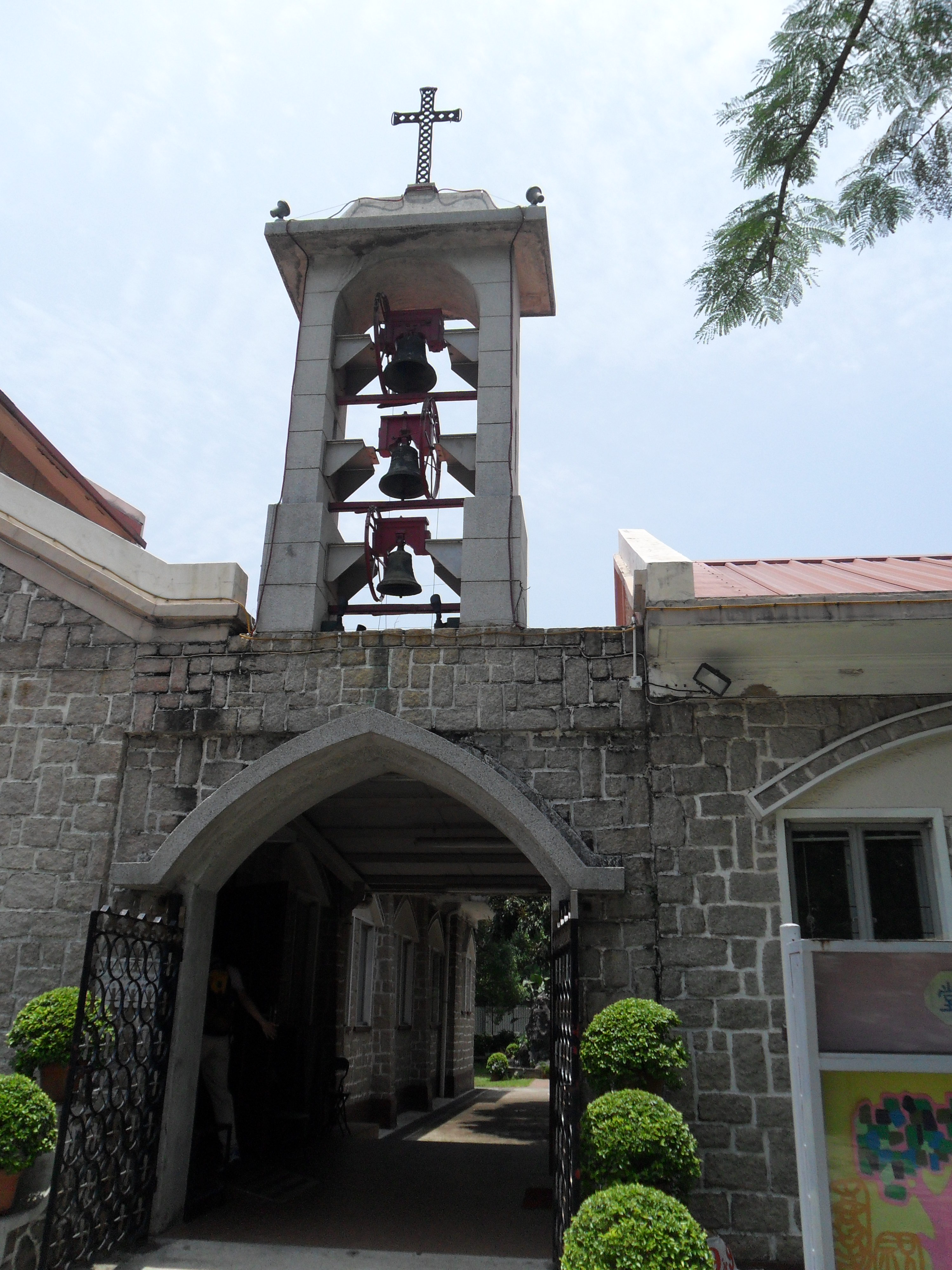 中文(香港): 粉嶺聖若瑟堂外貌, , 香港, 中國